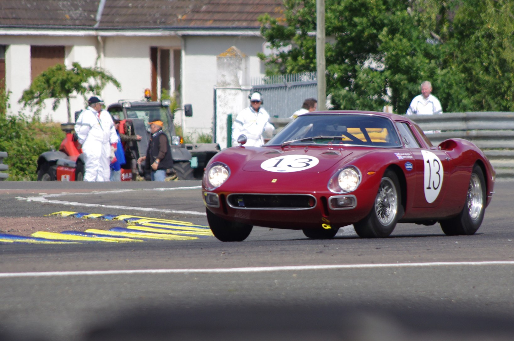 Le Mans 2011 Legends Race